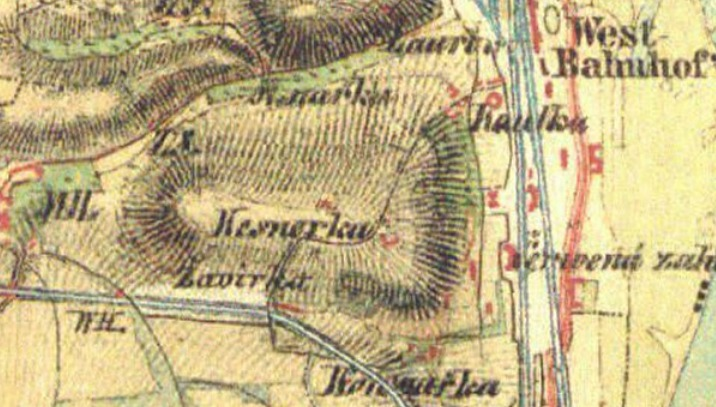 Smíchov, kopec Na Brabenci na mapě 2. vojenského mapování.